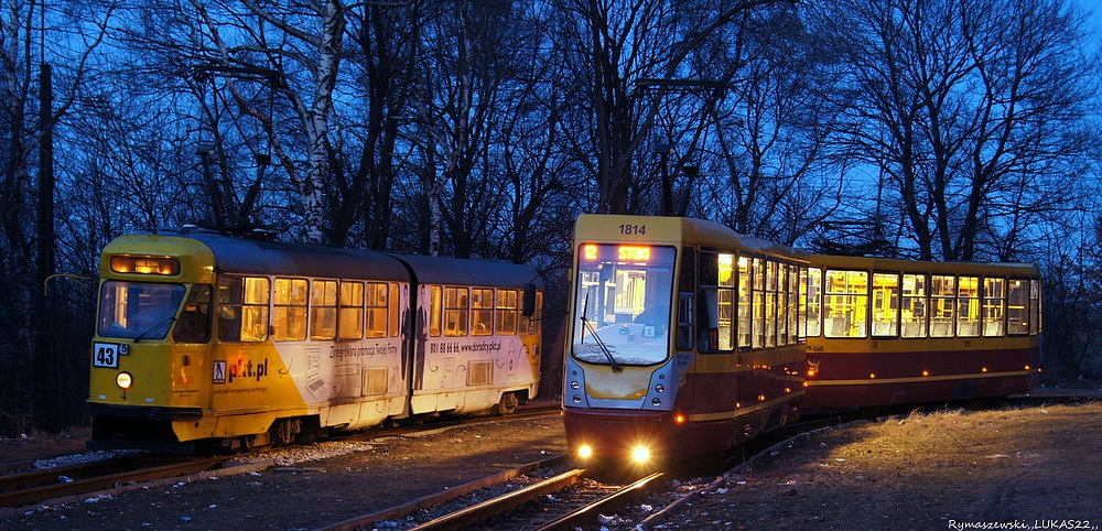 linia 12 i 43 na Stokach jako TP4 I MPK 1814+1815.